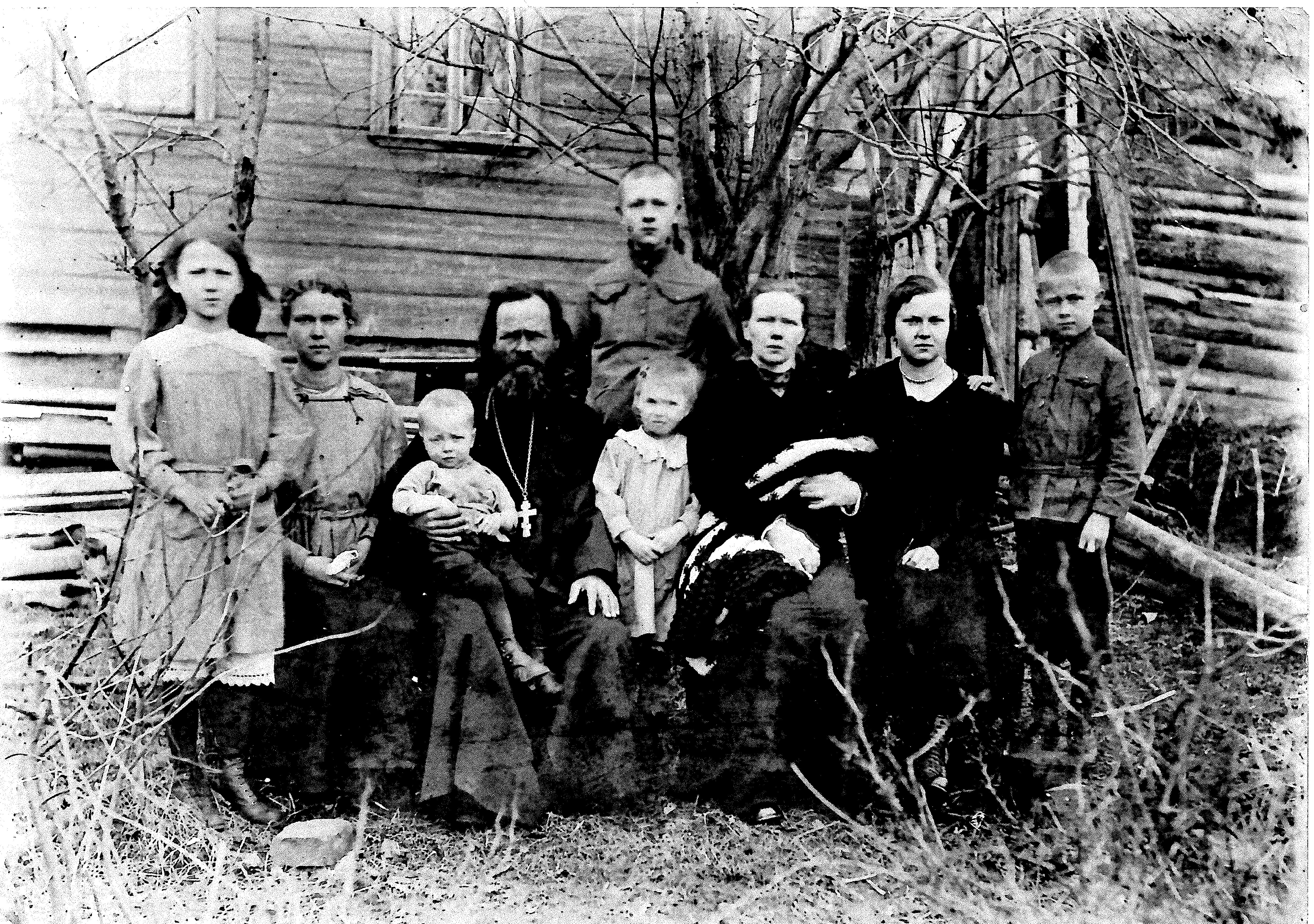 Семья Соколова Сергея Яковлевича, деда по матери